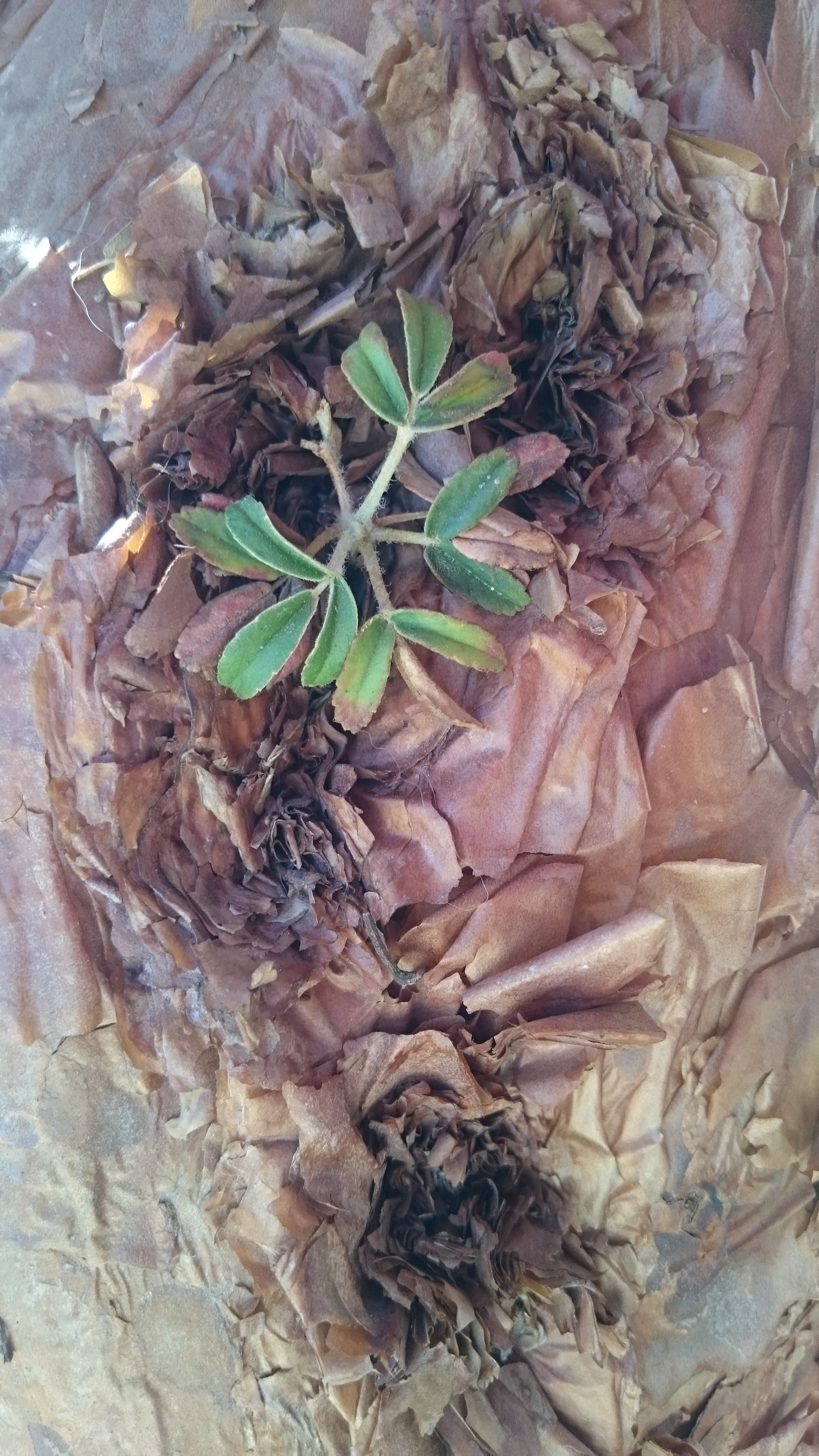 Retoño de Keñua, polylepis